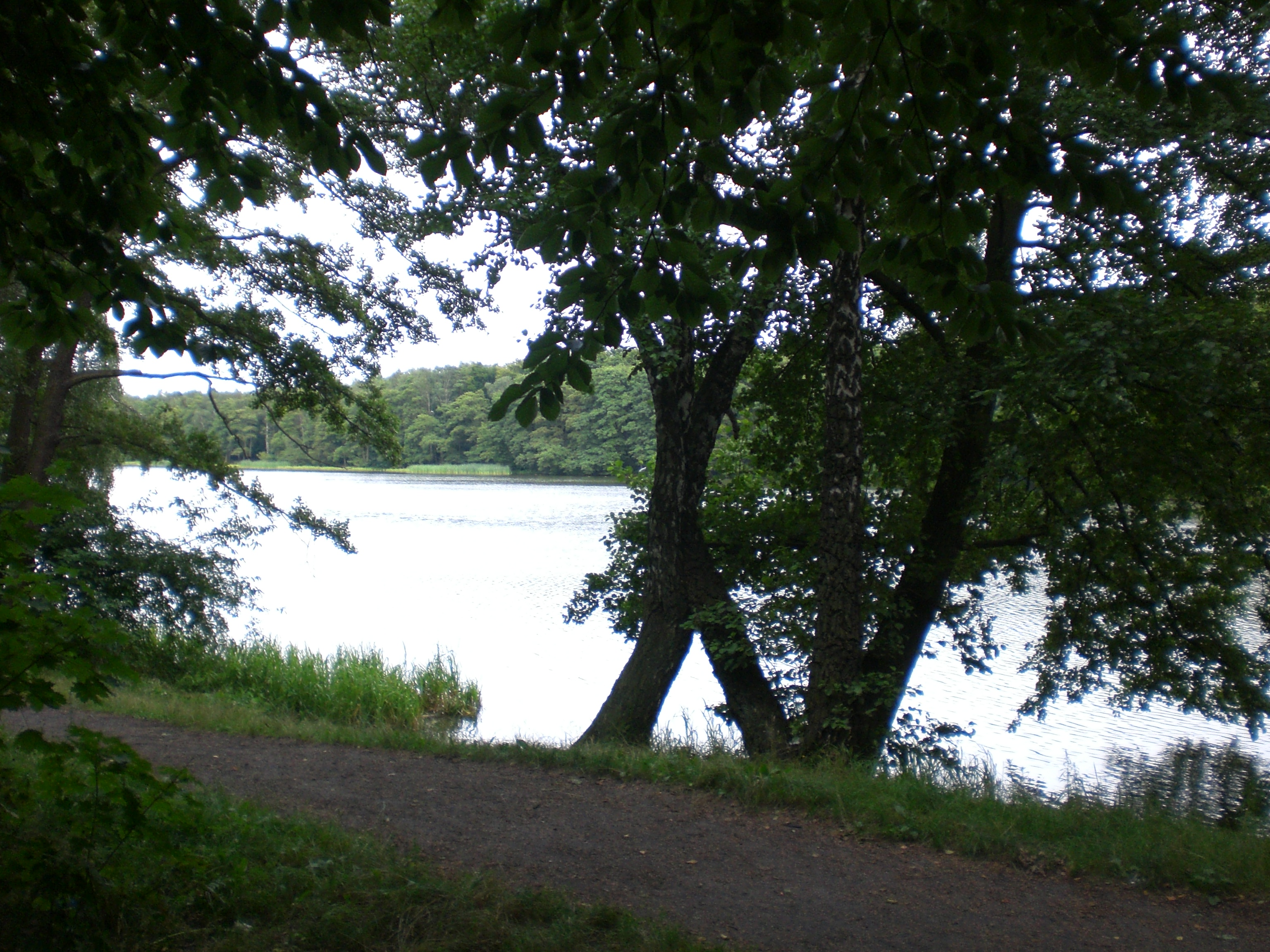 Gdańsk Stogi - Pusty Staw